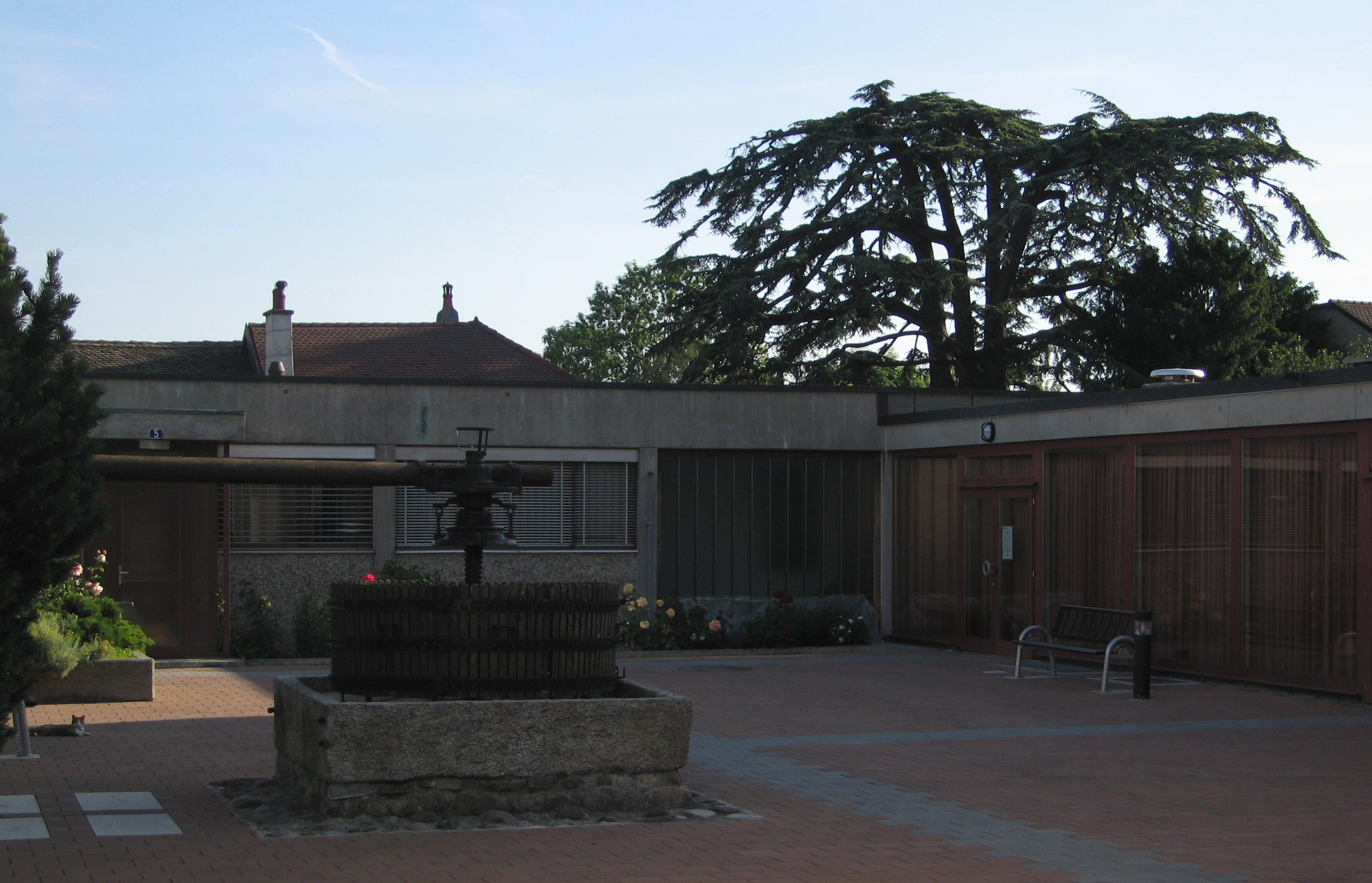 Batiments communaux de Paudex